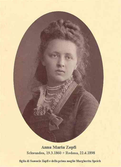 Maria Zopfi figlia di Samuele e della prima moglie Streiff. Moglie del Dott. Giovanni Giacomo Trumpy